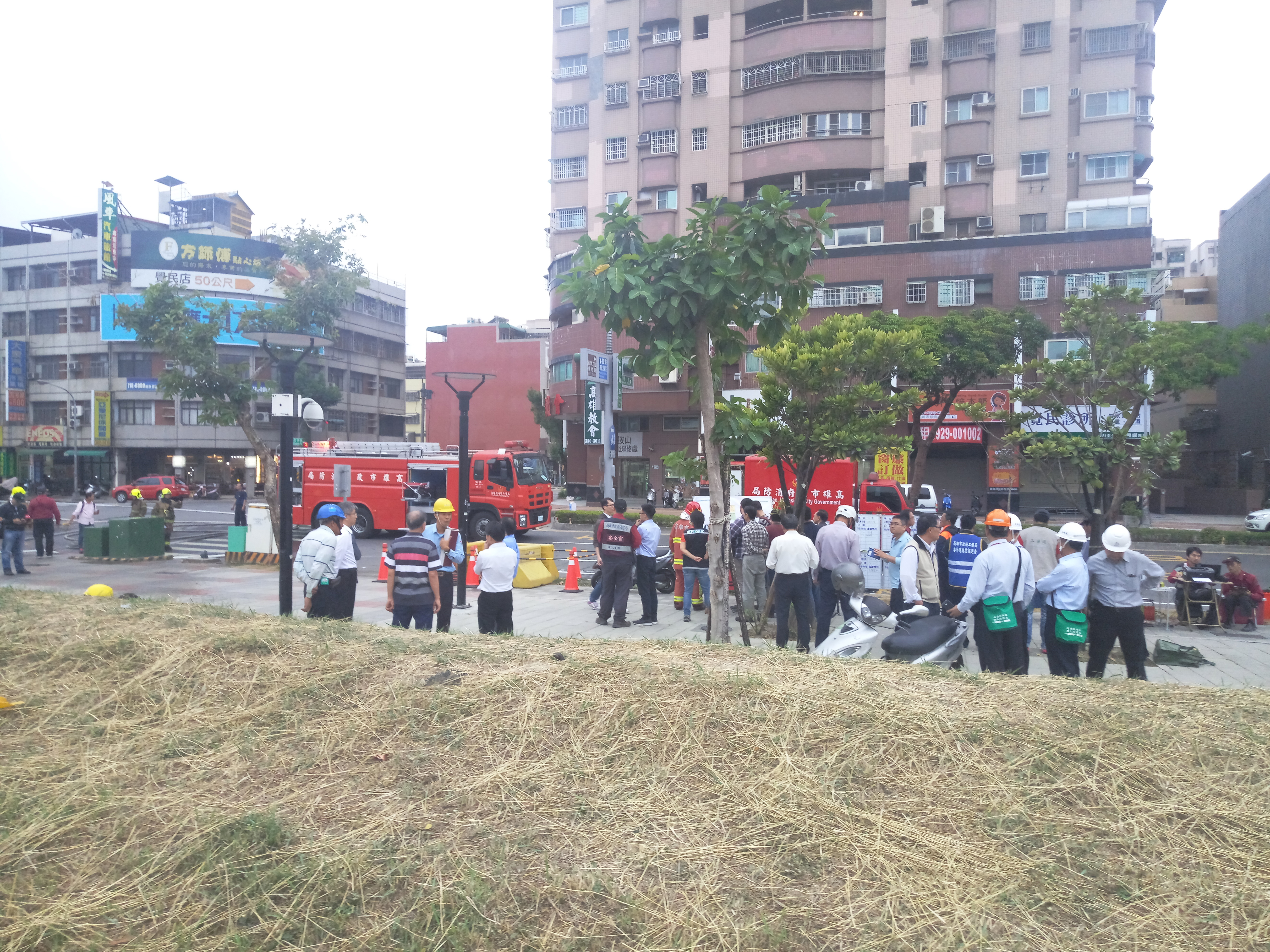 2017年3月17日高雄市三民區下水道氣爆事故